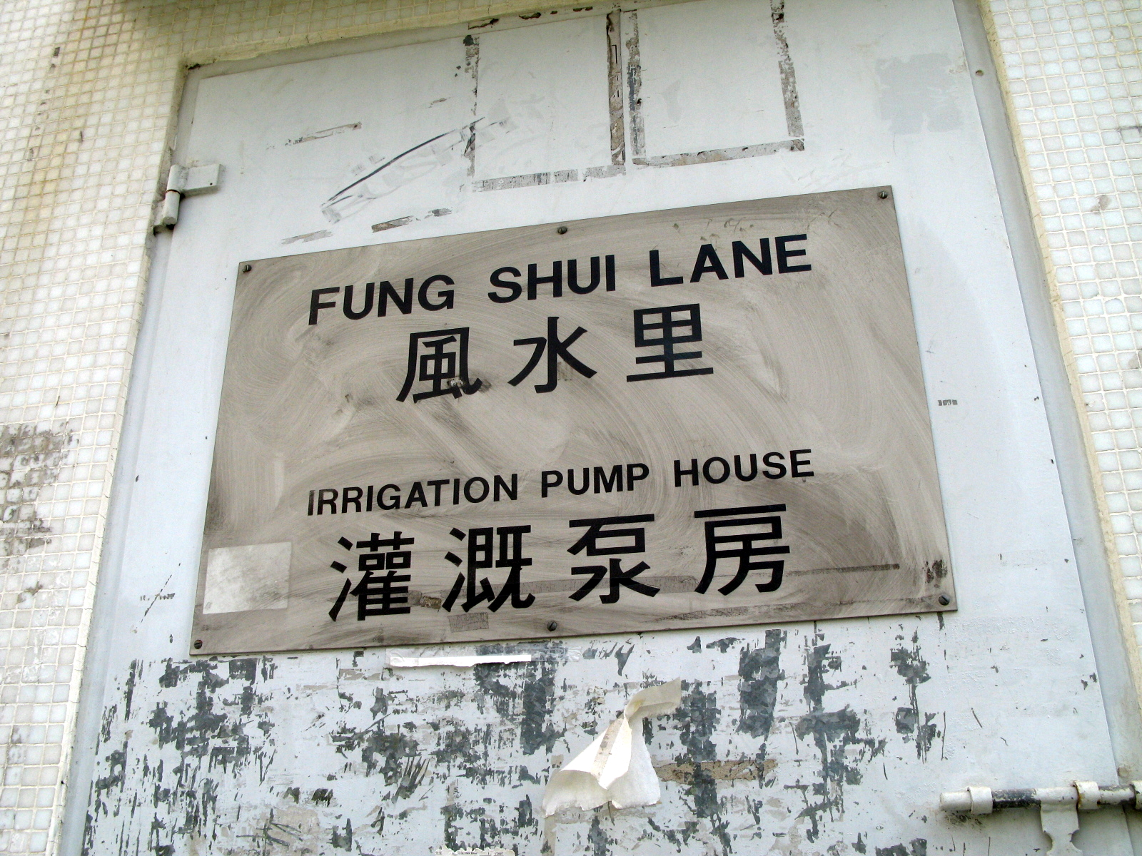 Fung Shui Lane Sign in Tin Shui Wai